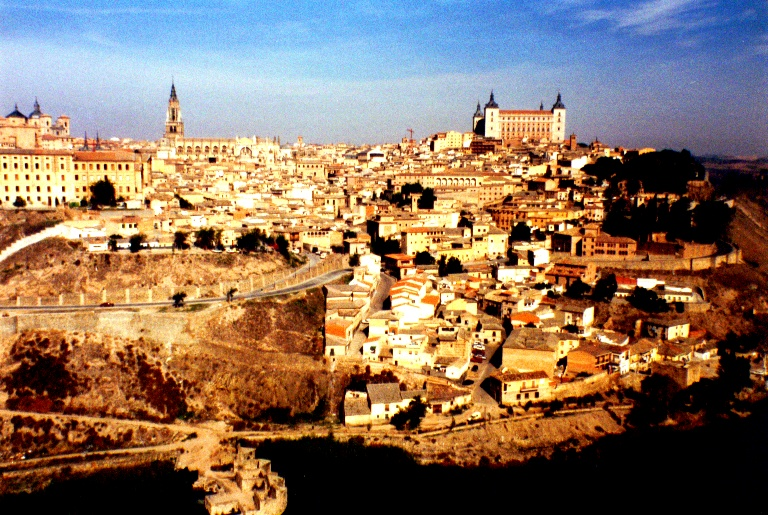 Selbst aufgenommen von Gerold Meiners im Jahre 1985 Freigegeben